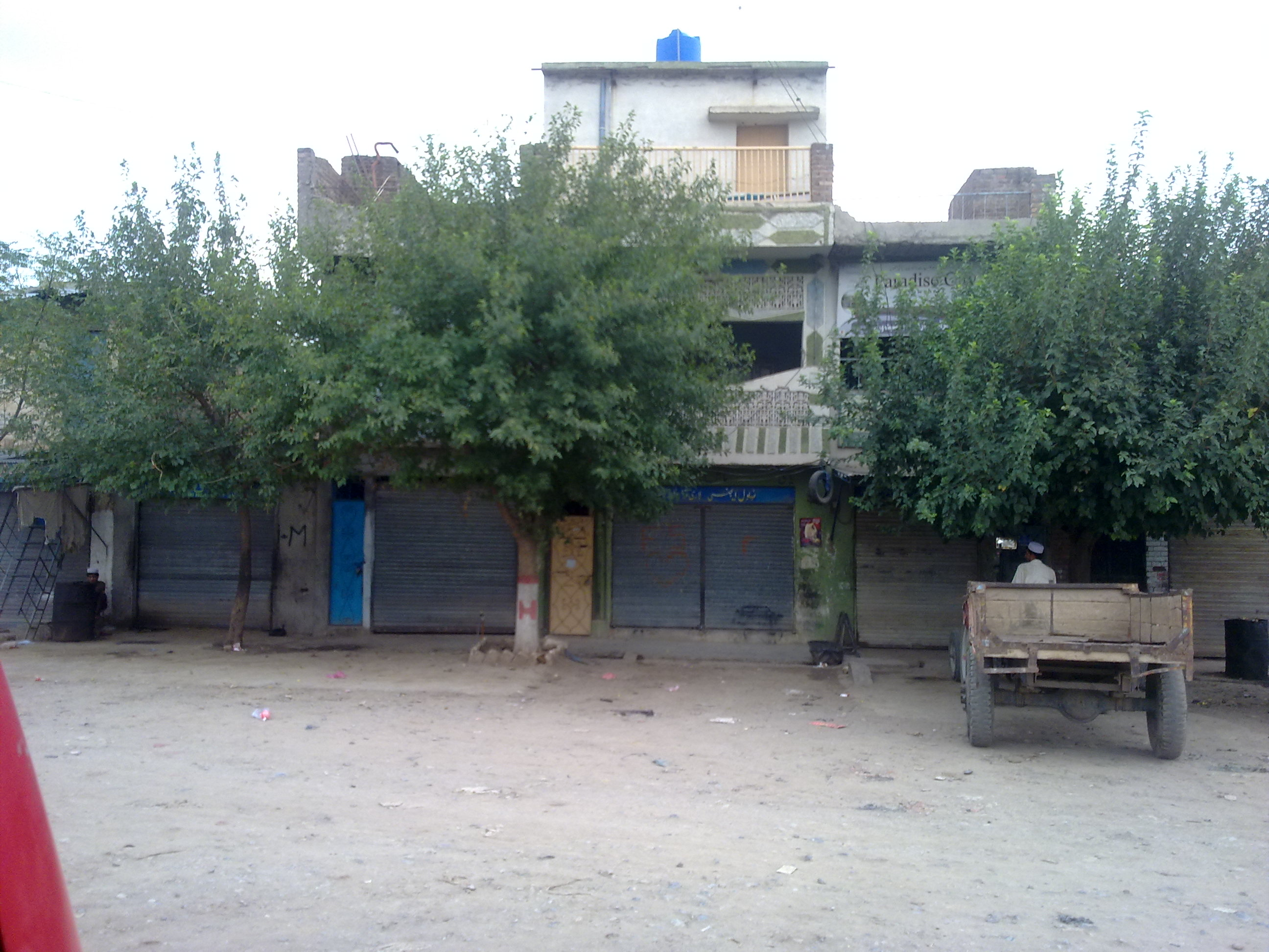 Thal Ada 32